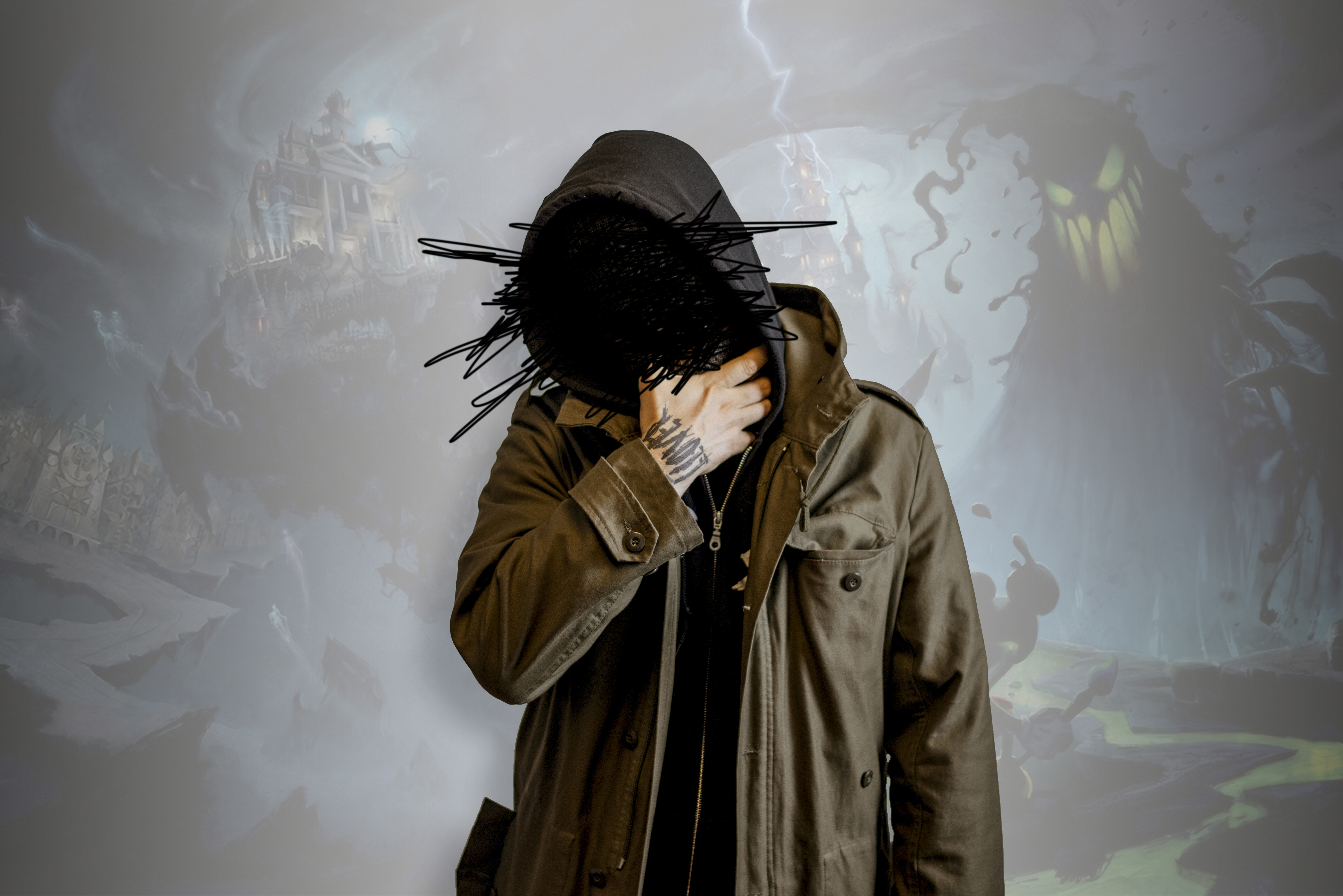 Pressefoto von Destroy Degenhardt